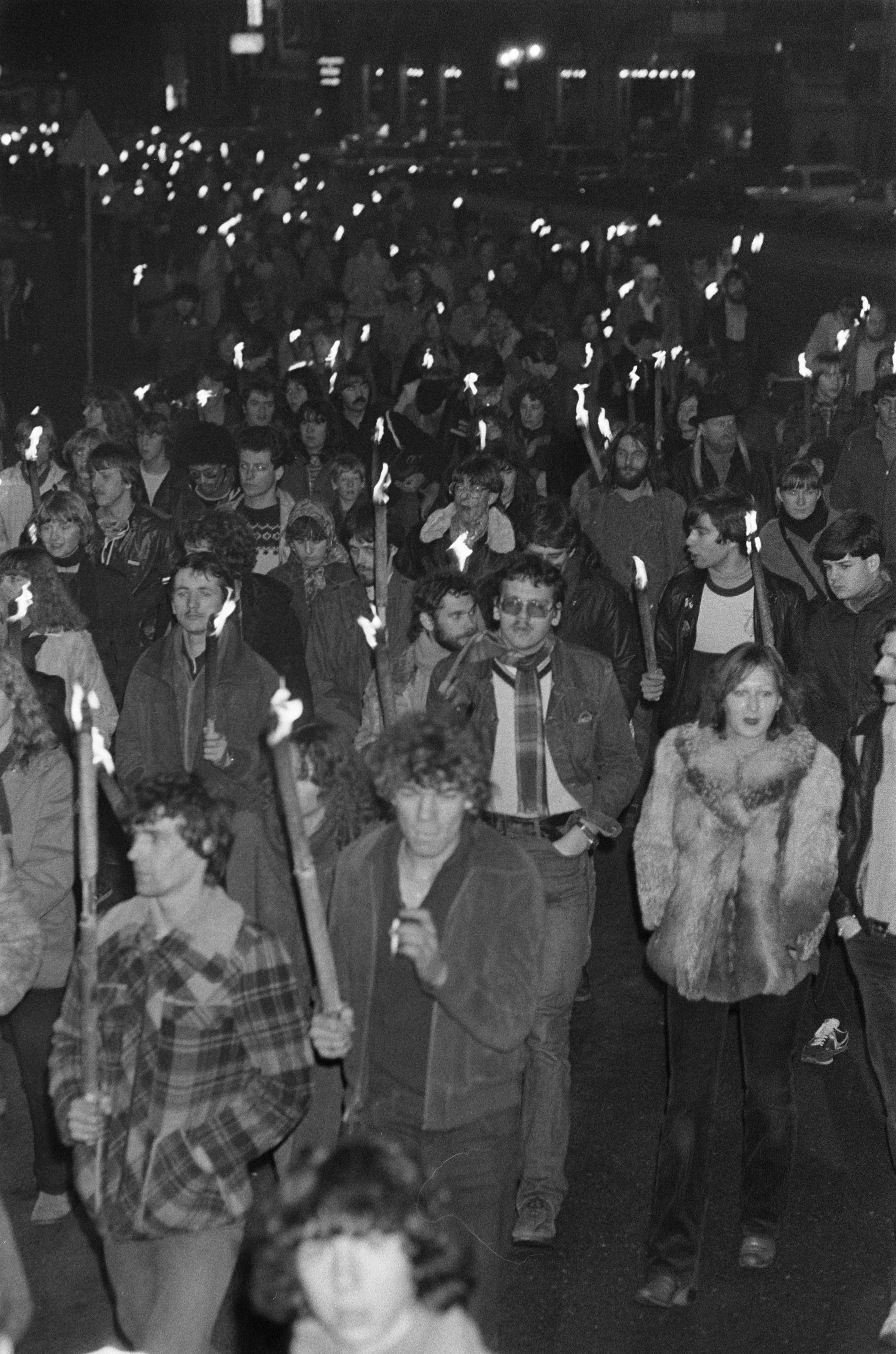 Collectie / Archief : Fotocollectie Anefo Reportage / Serie : [ onbekend ] Beschrijving : Fakkeloptocht op het Rokin in Amsterdam, ter nagedachtenis van John Lennon; hieraan namen ongeveer 1000 mensen deel Datum : 12 december 1980 Locatie : Amsterdam, Noord-Holland Trefwoorden : fakkeloptochten Fotograaf : Antonisse, Marcel / Anefo Auteursrechthebbende : Nationaal Archief Materiaalsoort : Negatief (zwart/wit) Nummer archiefinventaris : bekijk toegang 2.24.01.05 Bestanddeelnummer : 931-2024